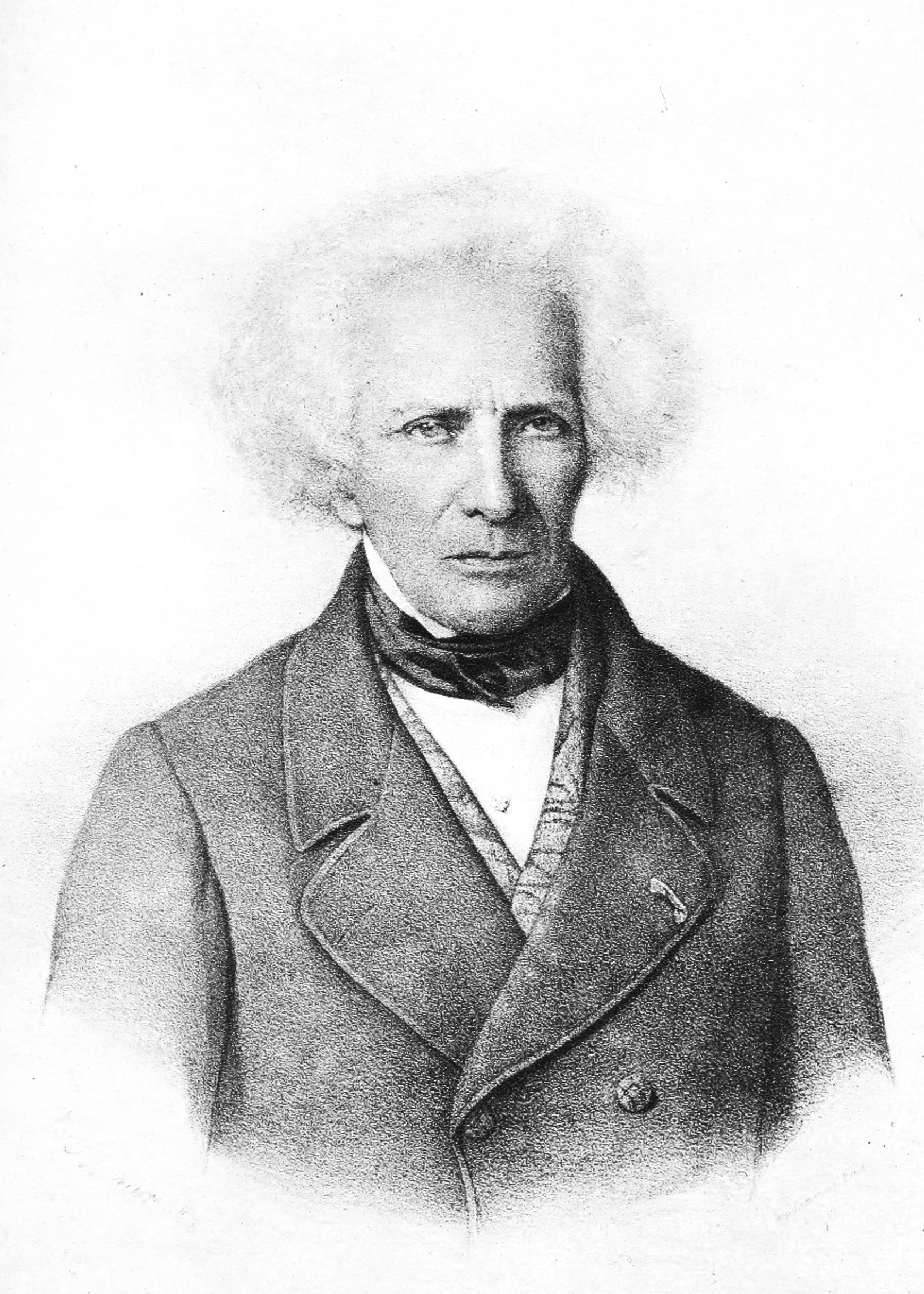 Leon Dufour